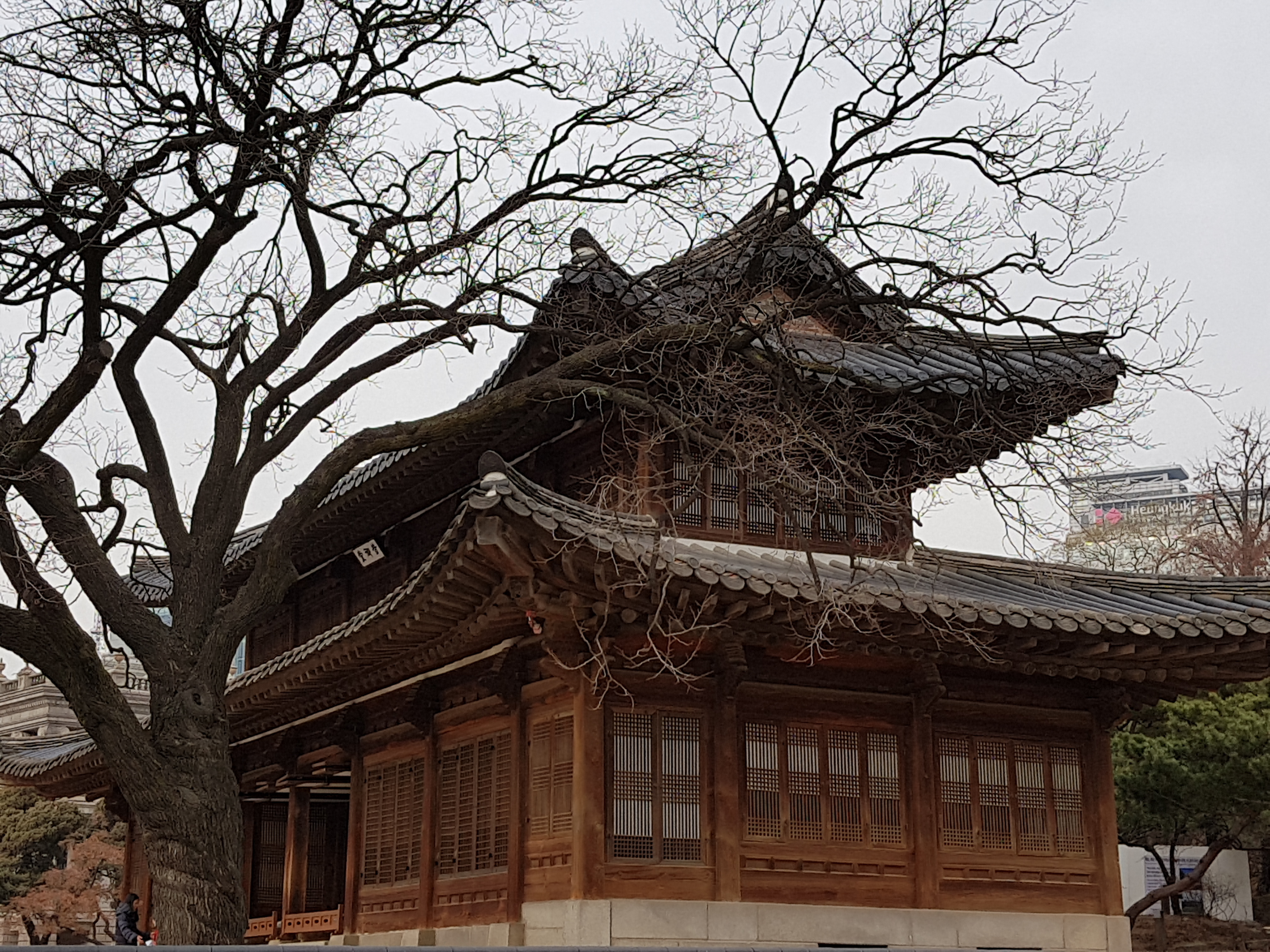 석어당은 월산대군 집을 임진왜란 후 행궁이 되면서 선조가 승하한 곳이고, 광해군이 제15대 왕으로 즉위한 곳이다.